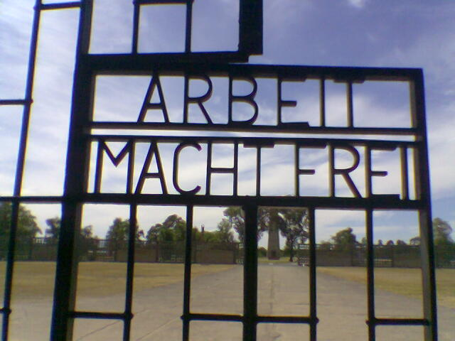 Beschreibung: Eingangstor des KZ-Sachsenhausen, 30.06.2005 Quelle: „selbst fotografiert“ Fotograf oder Zeichner: Ice-Fire Lizenz